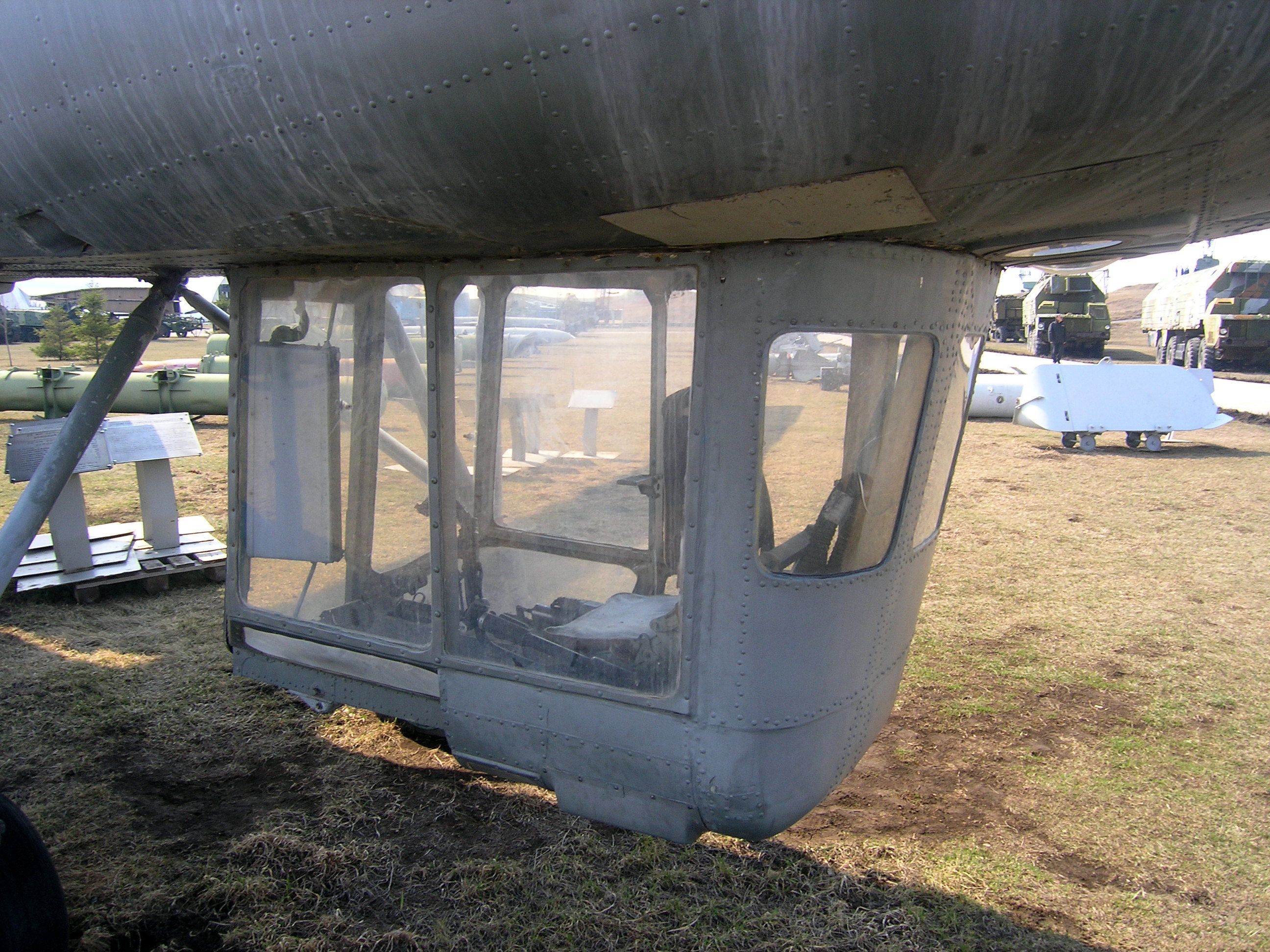 Вертолёт Ми-10К в Техническом музее Тольятти